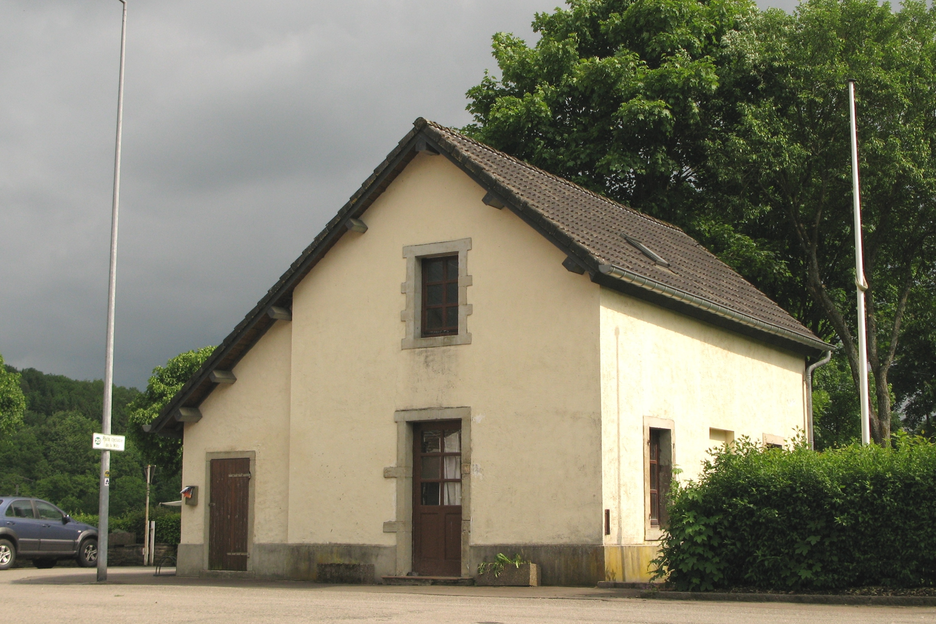 D'Gardshaischen an der Schleef am Mee 2008.